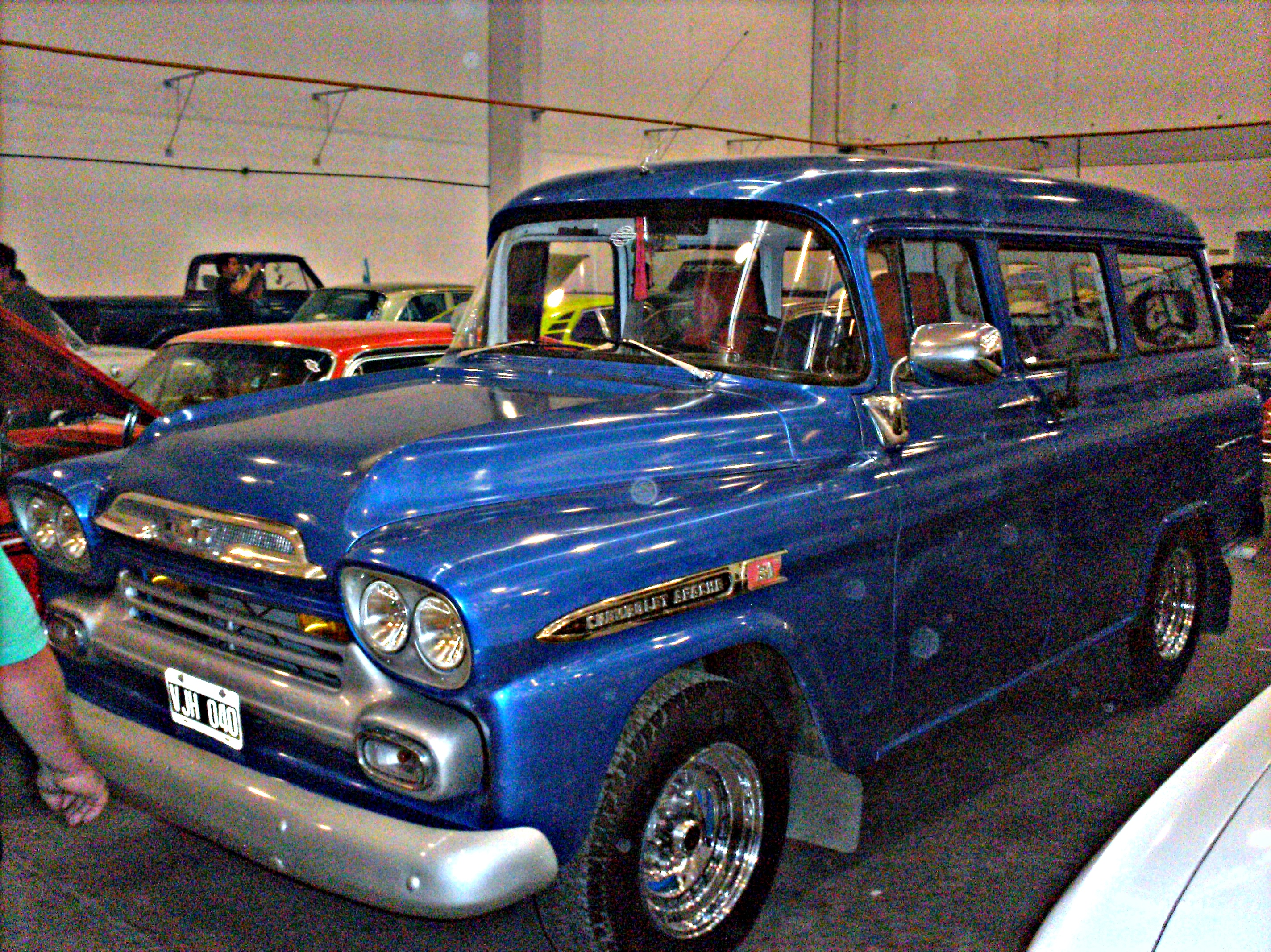 1959 Chevrolet Suburban Task-Force Apache.